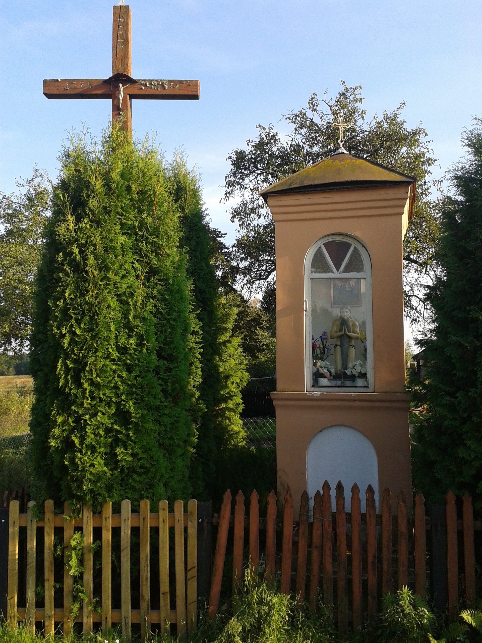 Kapliczka przydrożna z figurą św. Onufrego w Dobryniu Małym